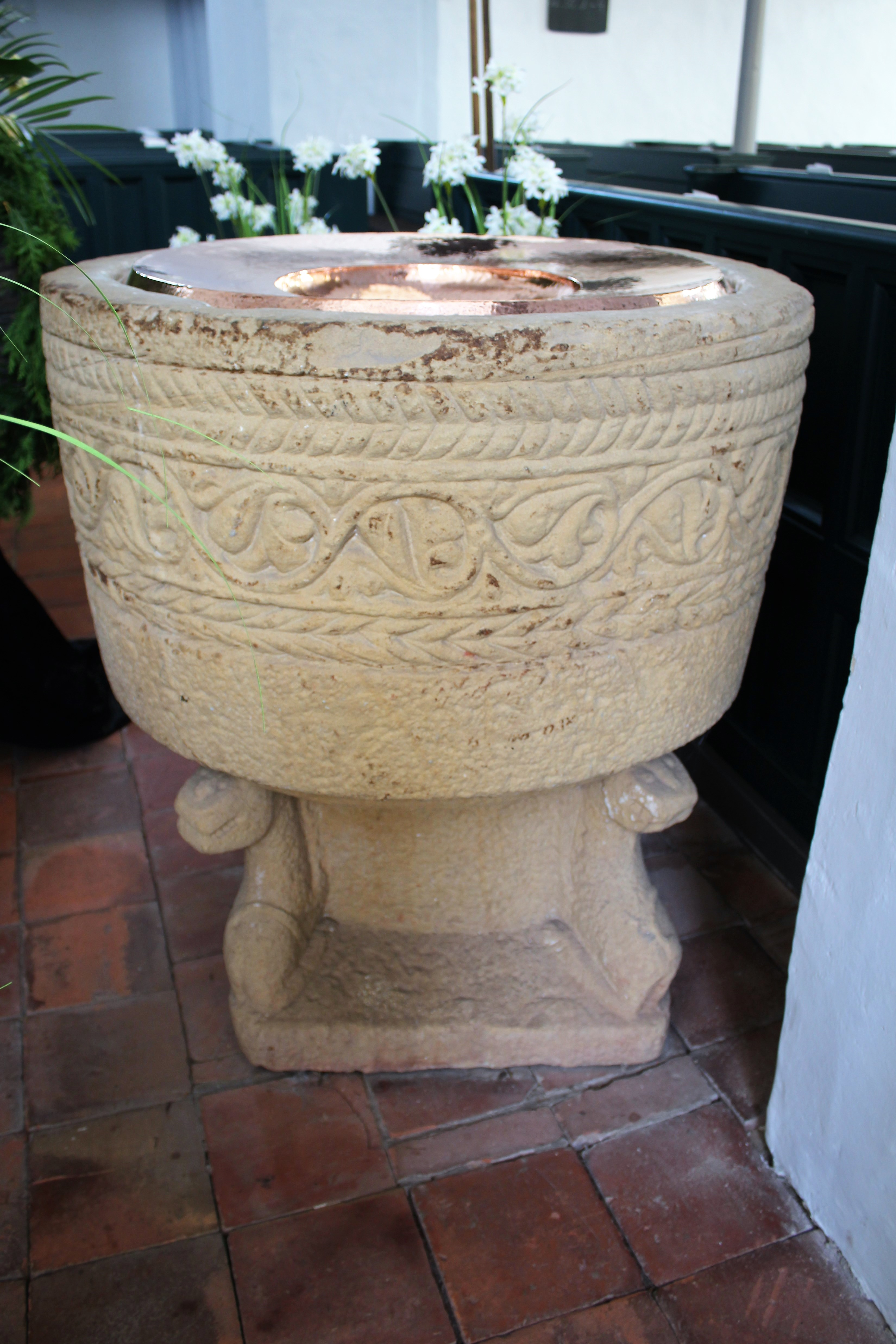 Ev.-reformierte Kirche Stapelmoor, Weener, Ostfriesland, Niedersachsen, Deutschland